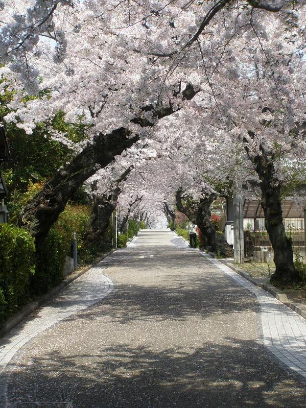 桃山町の桜並木